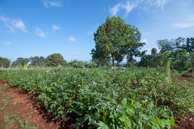 Un champ de culture de pomme de terre.